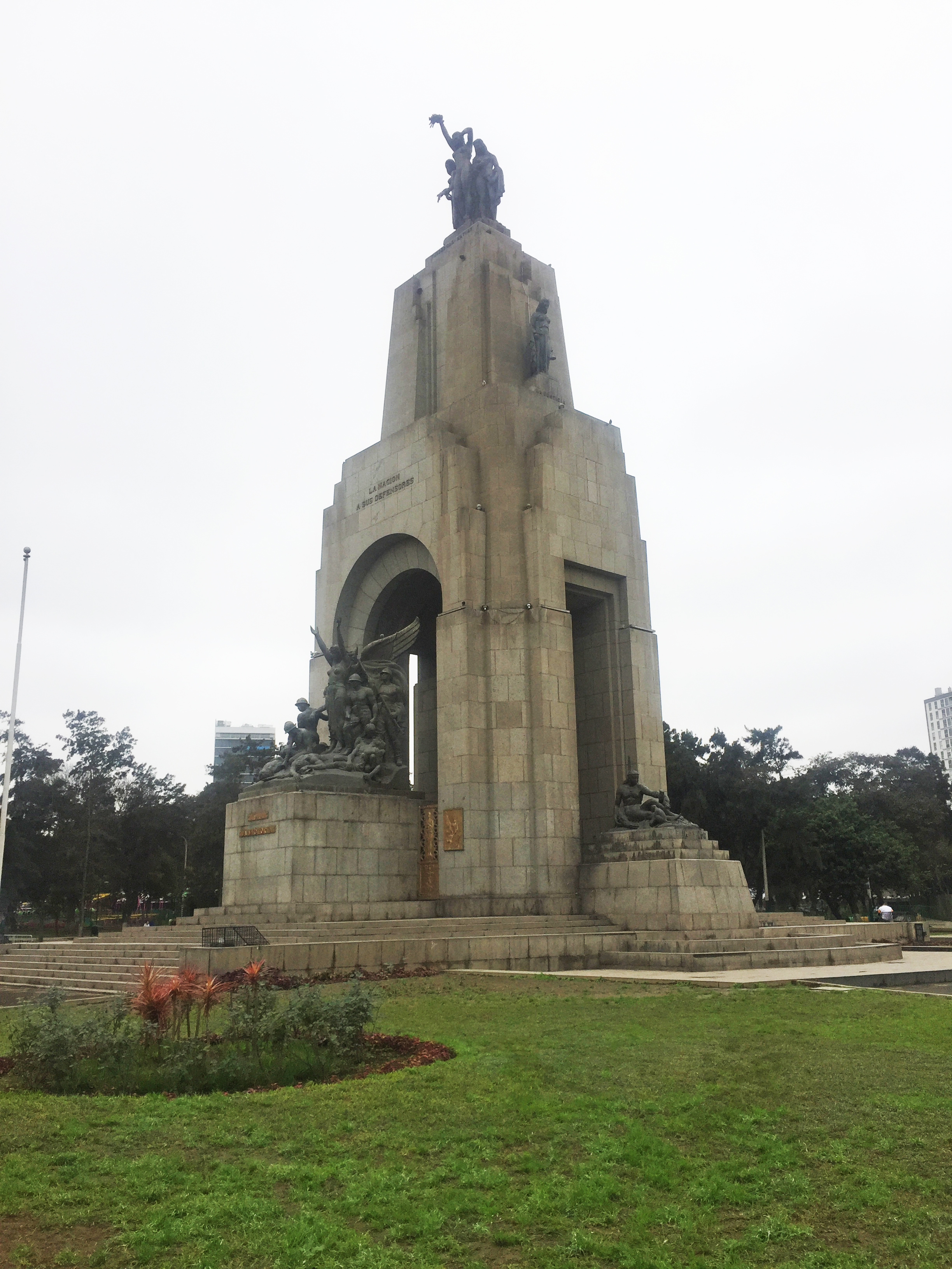 Campo de Marte